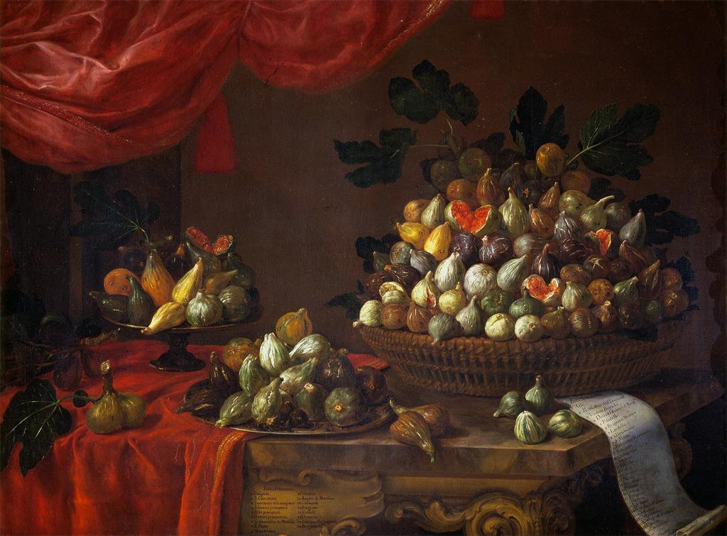 Figs